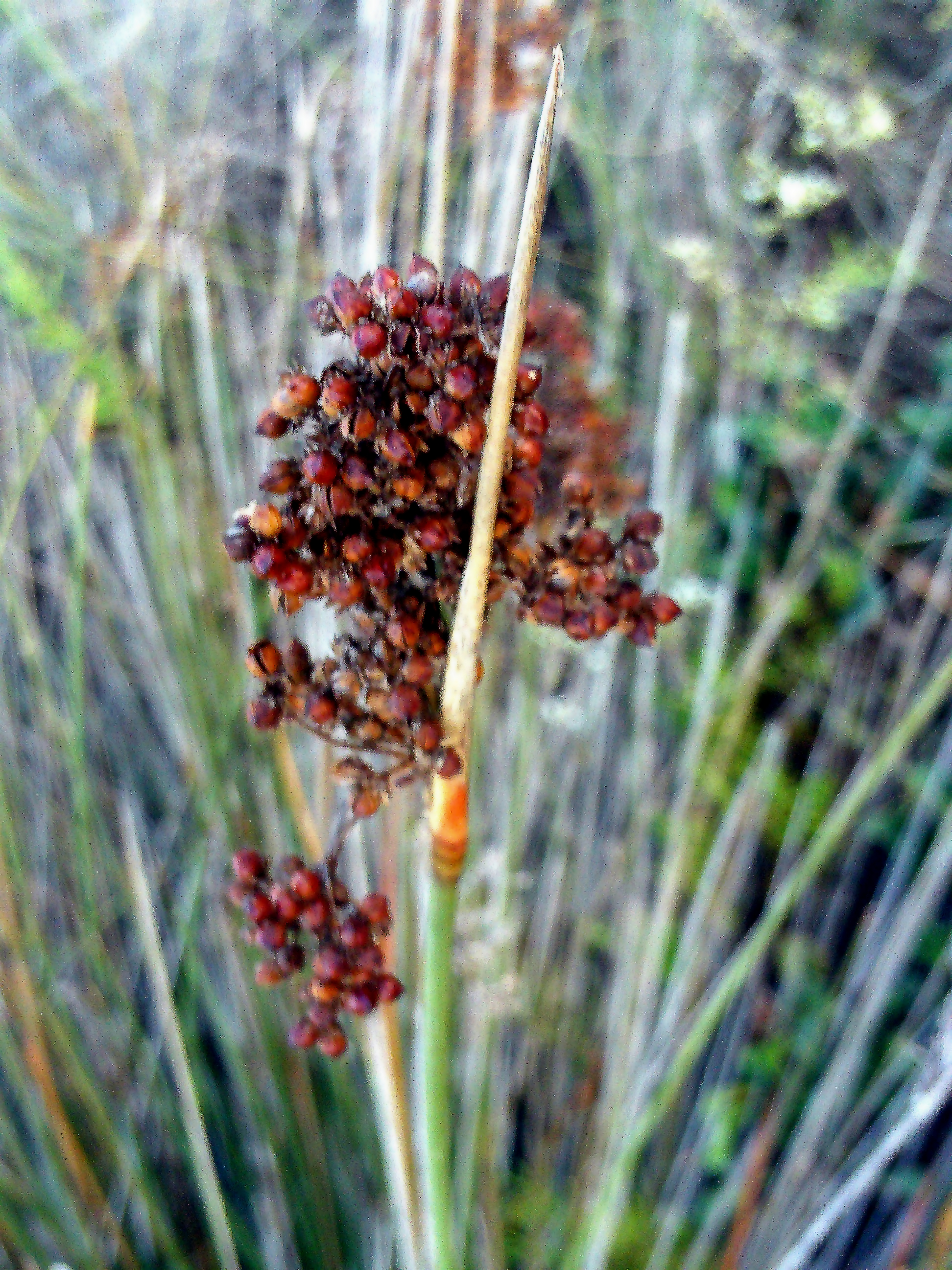 Juncus acutus subsp. acutus fruits closeup, La Mata, Torrevieja, Alicante, Spain